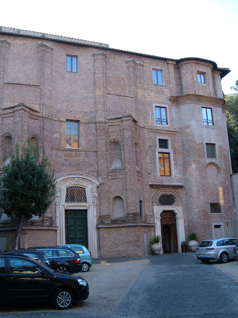 Complesso abbaziale di Santa Maria dei Sette Dolori, a Roma, nel rione Trastevere.